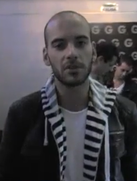 2 EDICIÓN NOV 2011 - REVISTA POSH - SALUDO DIEGO CADAVID